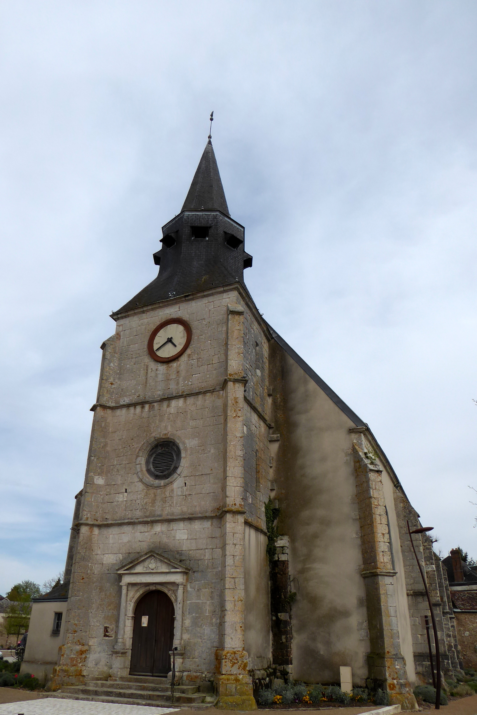 église Saint-Cheron, Bailleau-le-Pin, Eure-et-Loir (France).